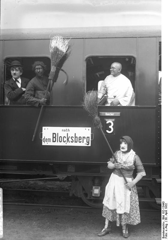 Die grosse Walpurgisfeier auf dem Brocken im Harz ! Der heilige Gedächtnistag der Patronin "Walpurga" gegen Hexenkünste ! Der "Geisterzug". Die Hexen und Geister fahren im Walpurgiszug zum Hexentanzplatz auf den Blocksberg. Links am Fenster ein als Charly Chaplin verkleideter Teilnehmer.